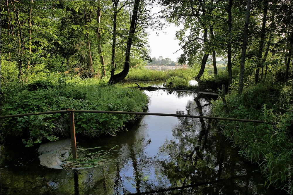 Гарнастаевічы. Рака